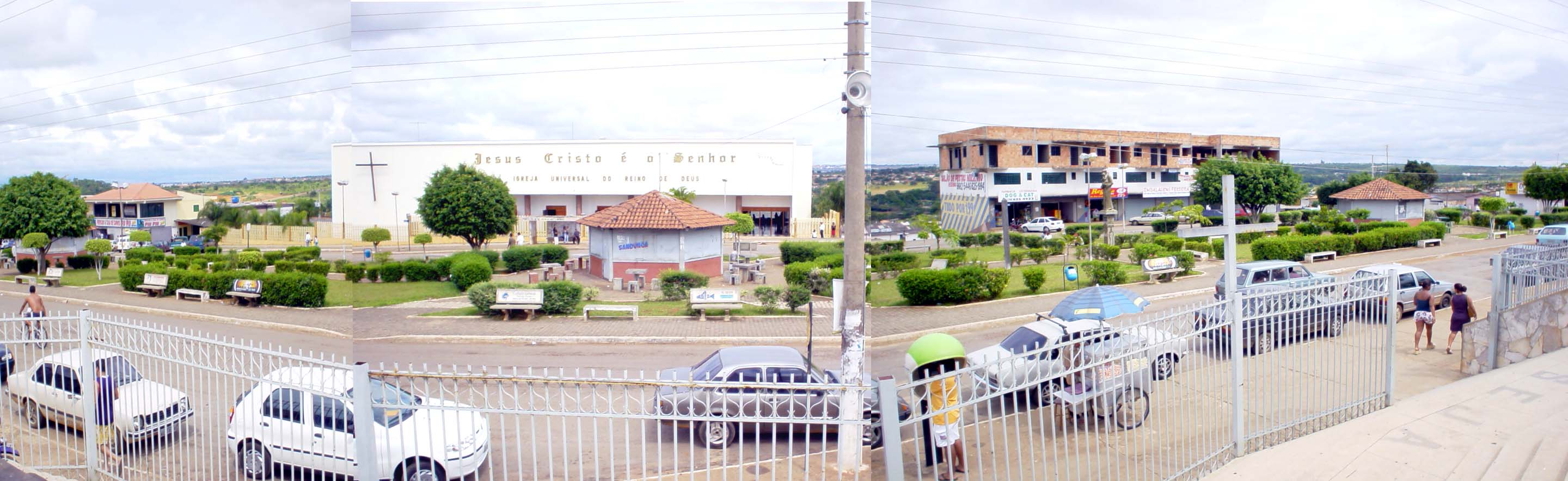 Vista Panorâmica de Cidade Ocidental a partir da Igreja Católica